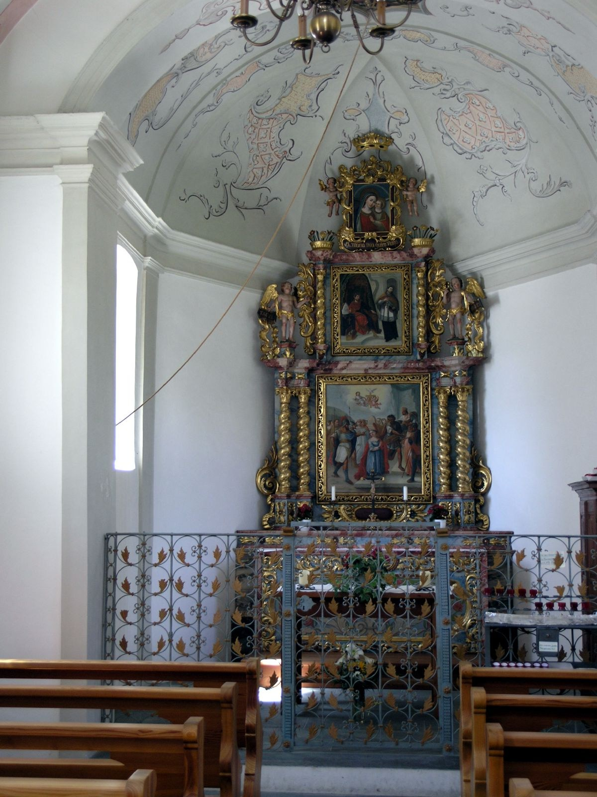 Altar in der Kapelle St. Margarethe (1679) in Münster VS